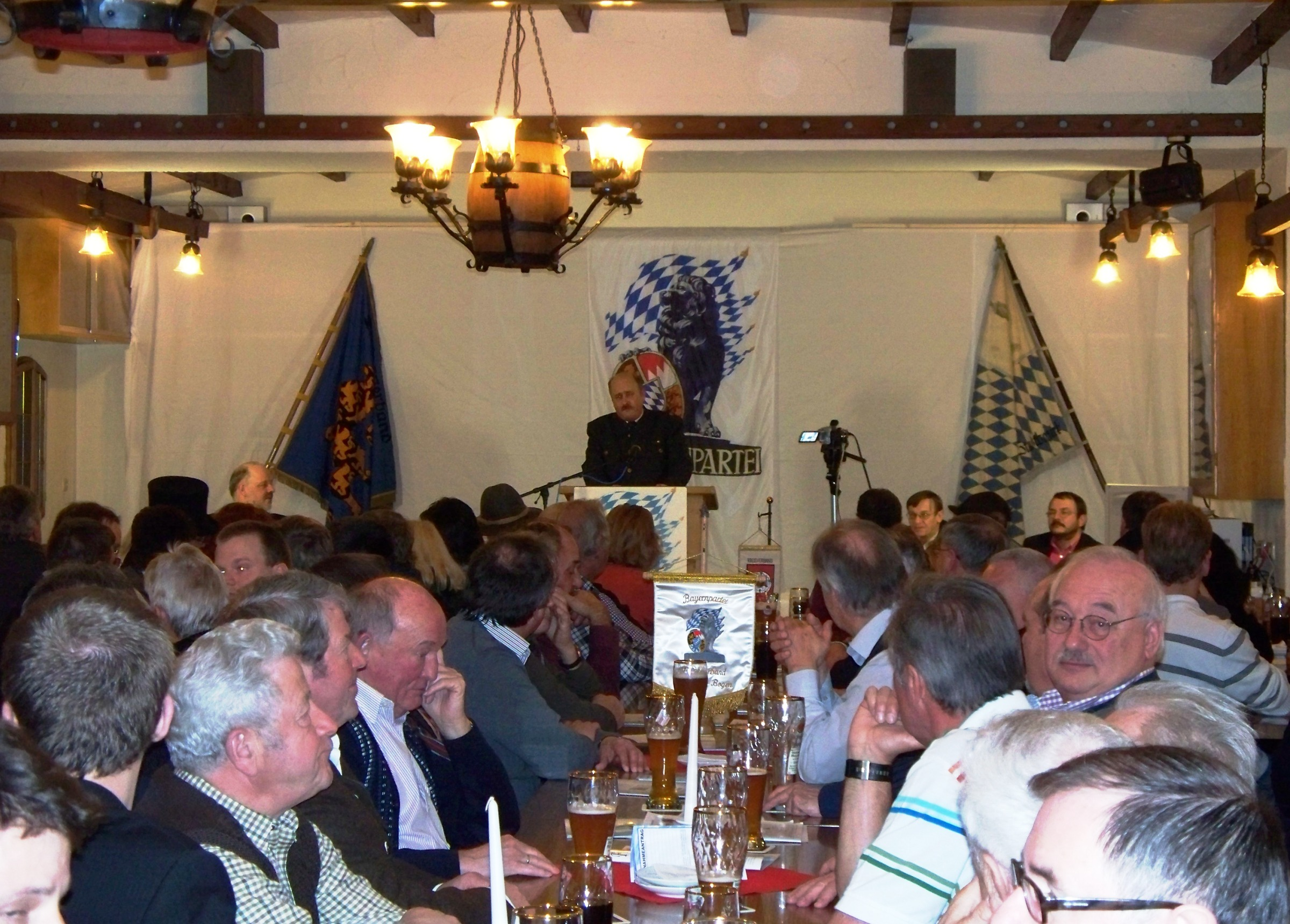 Der Politischen Aschermittwoch der Bayernpartei in Vilshofen an der Donau im Jahr 2011. Es spricht Hubert Dorn.